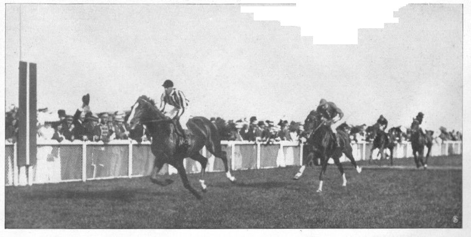 Vom Deutschen Derby in Hamburg-Horn. Oben: Blick auf die Bahn während der Entscheidung des Derbys.